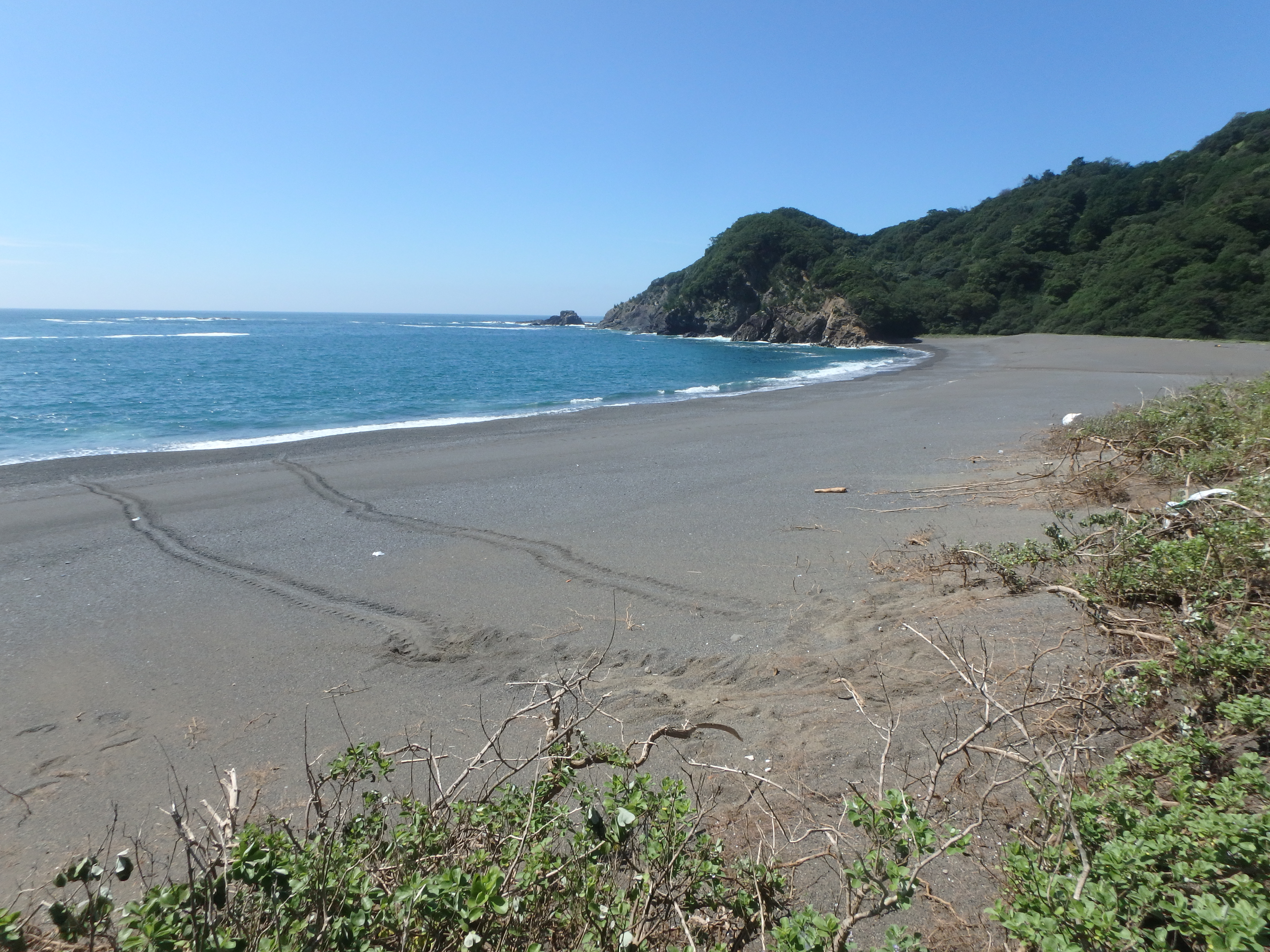 原発建設計画のあった南島町(現南伊勢町)の芦浜の海亀産卵跡。 1963年に計画が発表され、地元の人びとの反対運動により2000年に白紙撤回された。 芦浜には海亀の産卵場所であるほか、海跡湖が存在し希少種はなまつめの群落があるなど貴重な自然が残っている。